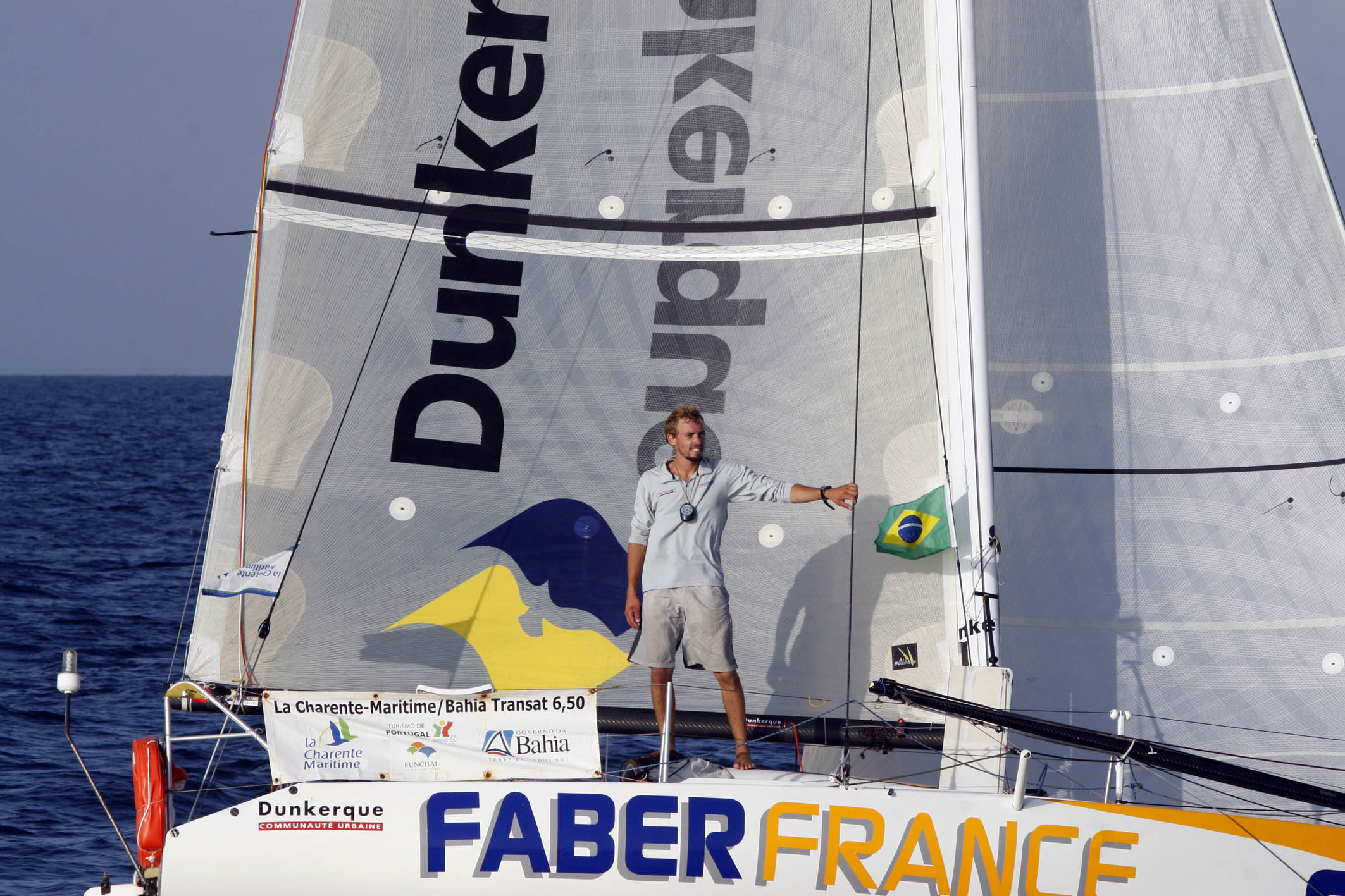 Esta é a segunda vez que Ruyant participa do evento. Em 2007 ele obteve a 19ª colocação. E agora, após uma intensa preparação de dois anos, foi recompensado com a primeira colocação entre as 79 embarcações que estão participando da regata. Foto: Arisson Marinho / AGECOM